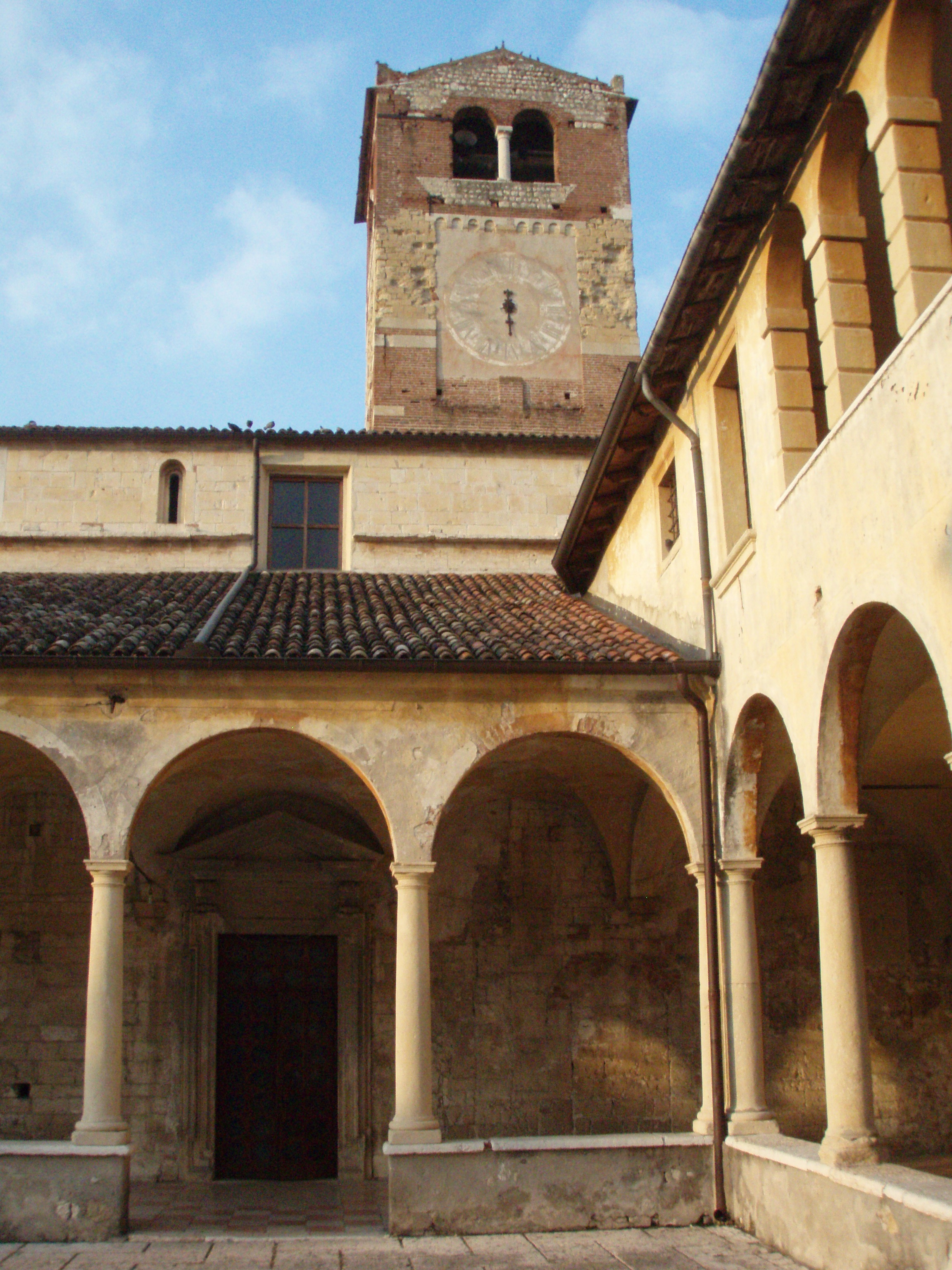 Chiostro della Pieve di San Floriano. San Pietro in Cariano (VR). XII secolo